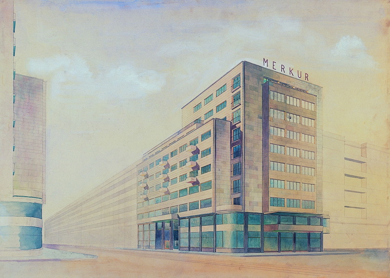 Palác pojišťovny Merkur, Praha - Staré Město, Revoluční 767. Perspektiva z užší soutěže. Ozalid, akvarel, nalepeno na kartonu, 52x72 cm.